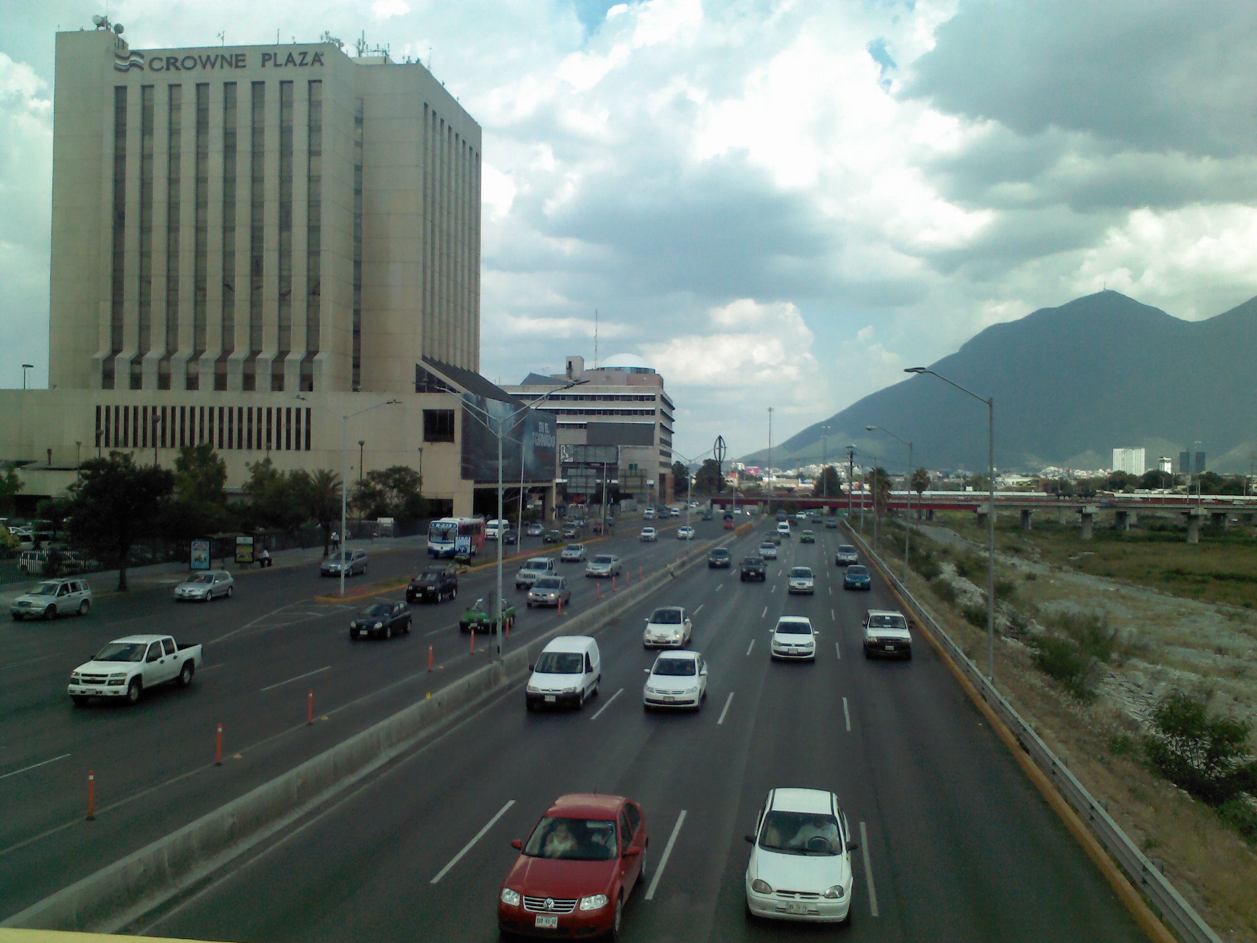 Avenida Constitución